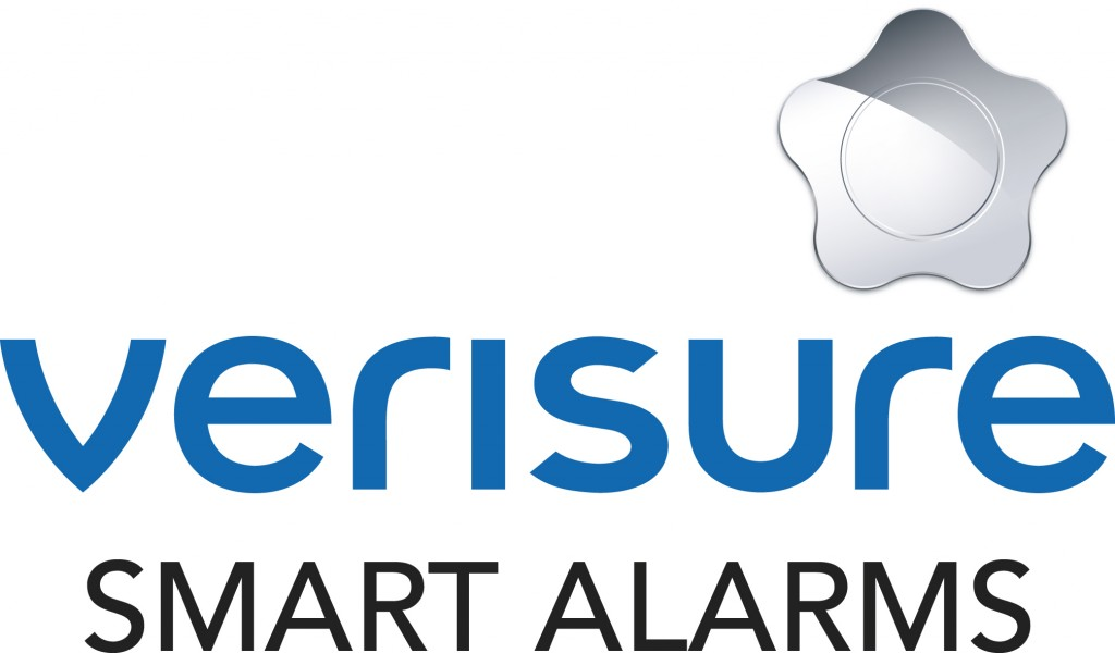 Verisure